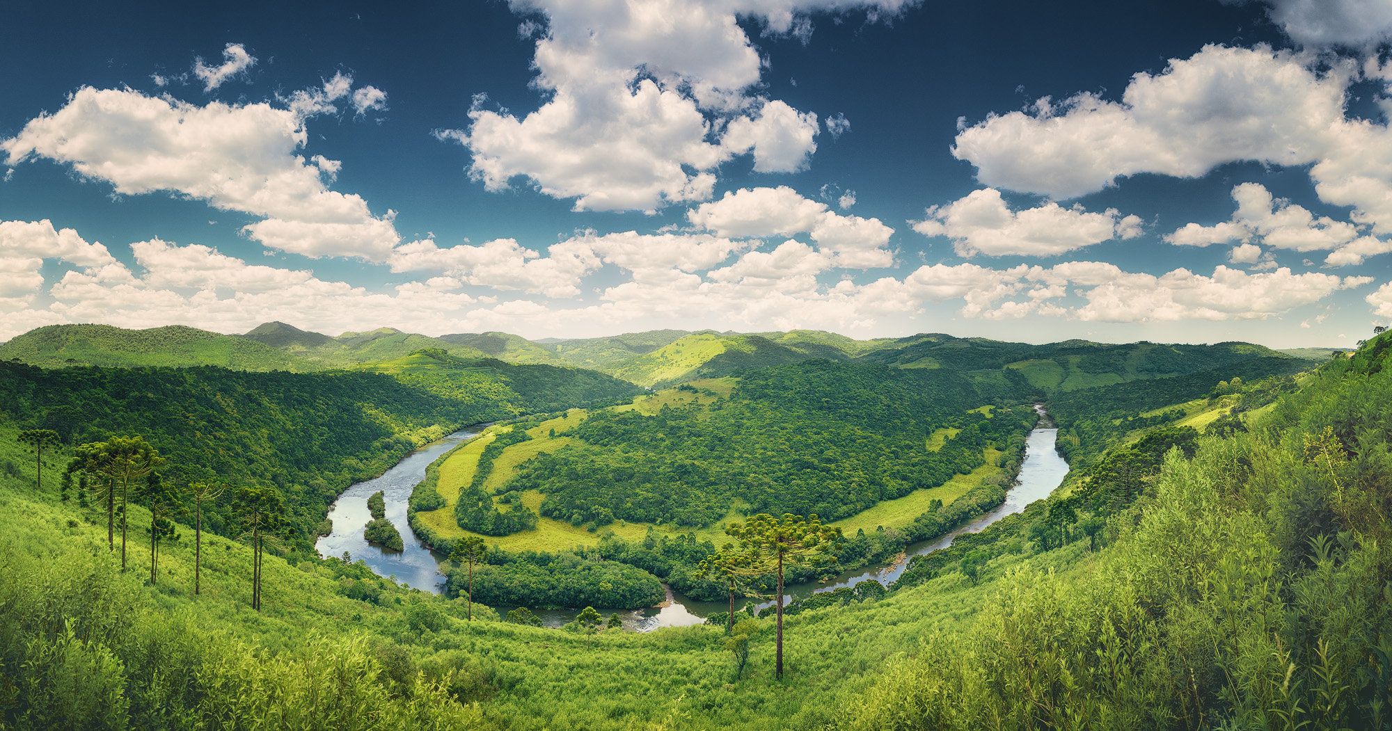 Curva típica do rio Pelotas, perto da divisa entre Rio Grande do Sul e Santa Catarina. Fotografia panorâmica.